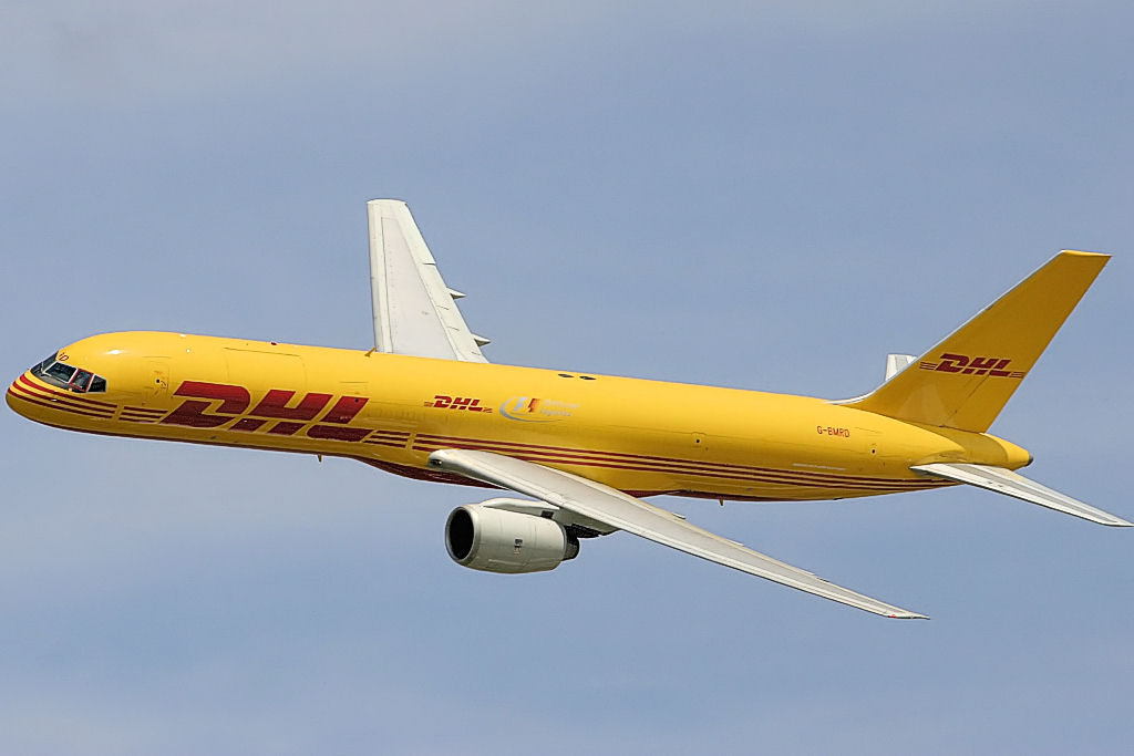 Boeing 757 - RIAT 2005